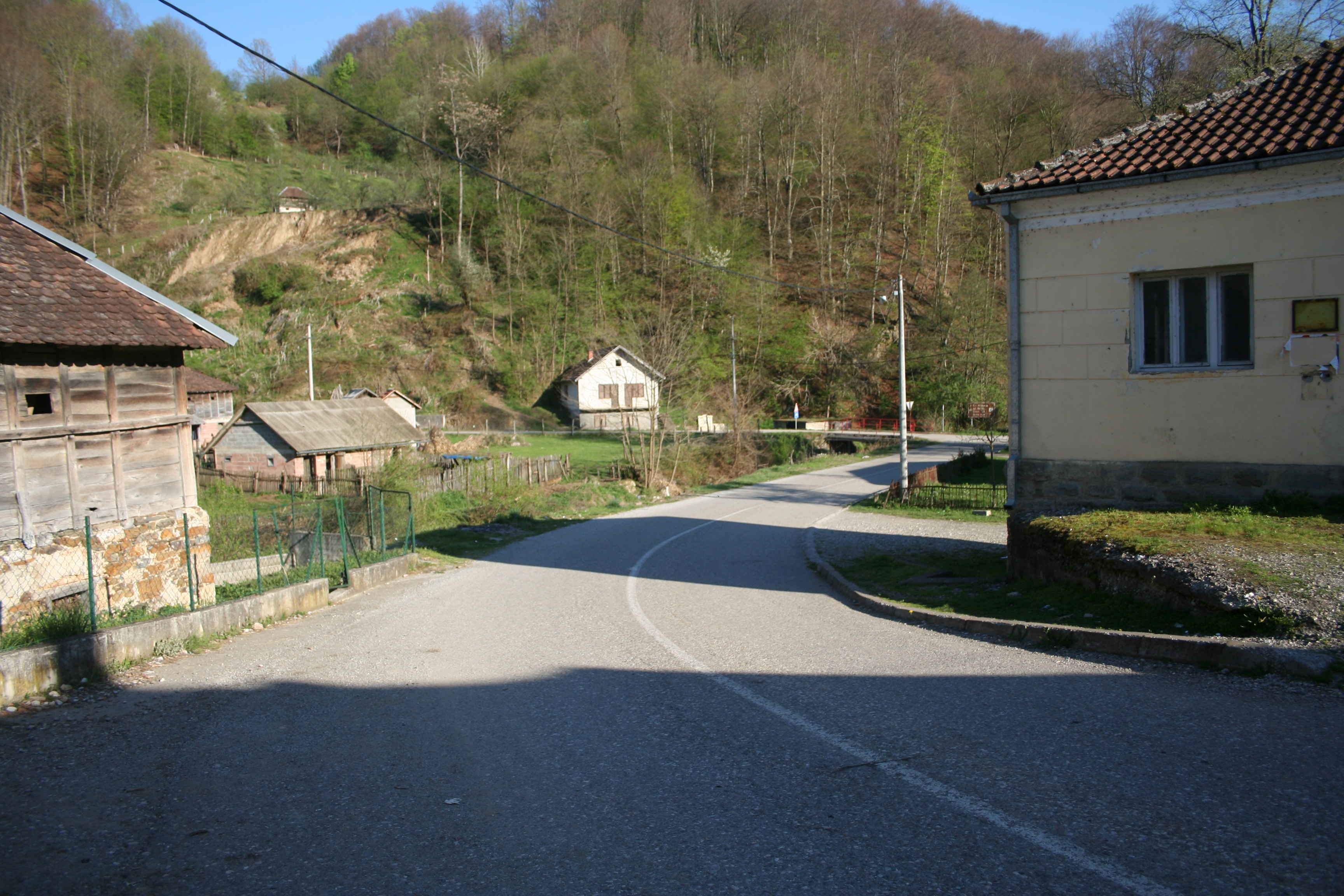 Centar sela, Gračanica